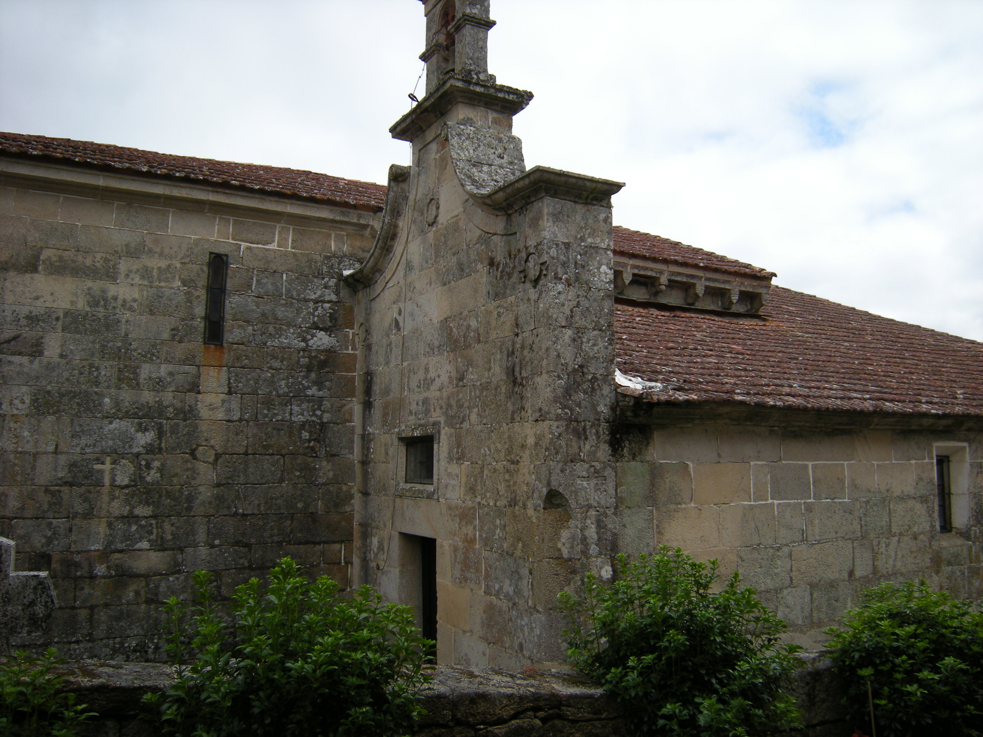 Muro sur de la nave con la capilla adosada en un extremo.